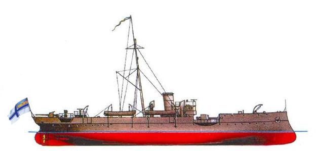 Канонерская лодка Украинского Державного Флота «Донец», 1918.